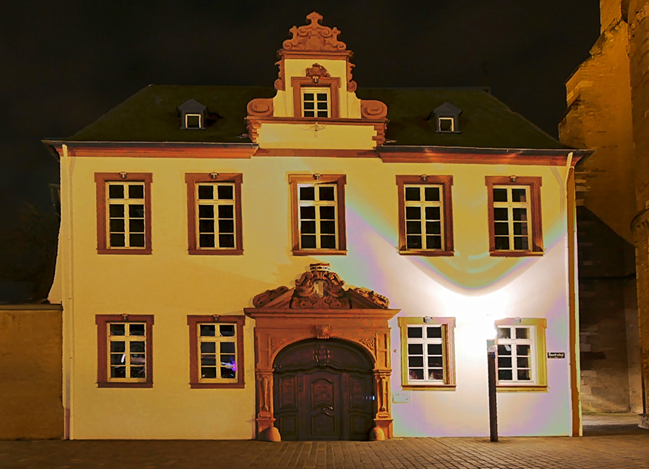 Trier Domkurie Domfreihof 4. Dompropstei; bauliche Gesamtanlage mit Torhaus, Wirtschaftsgebäude und Wohnhaus, 17. und 18. Jahrhundert, Rokoko-Ausstattung; Torhaus: stattlicher barocker Walmdachbau, bezeichnet 1656; Ökonomie, ehemals offene Remise, um 1656, Umbau im dritten Viertel des 18. Jahrhunderts; Haupthaus: winkelförmiger barocker Walmdachbau, teilweise über romanischem Keller; in der Umfassungsmauer (Windstraße) Portalsturz, bezeichnet 1689.